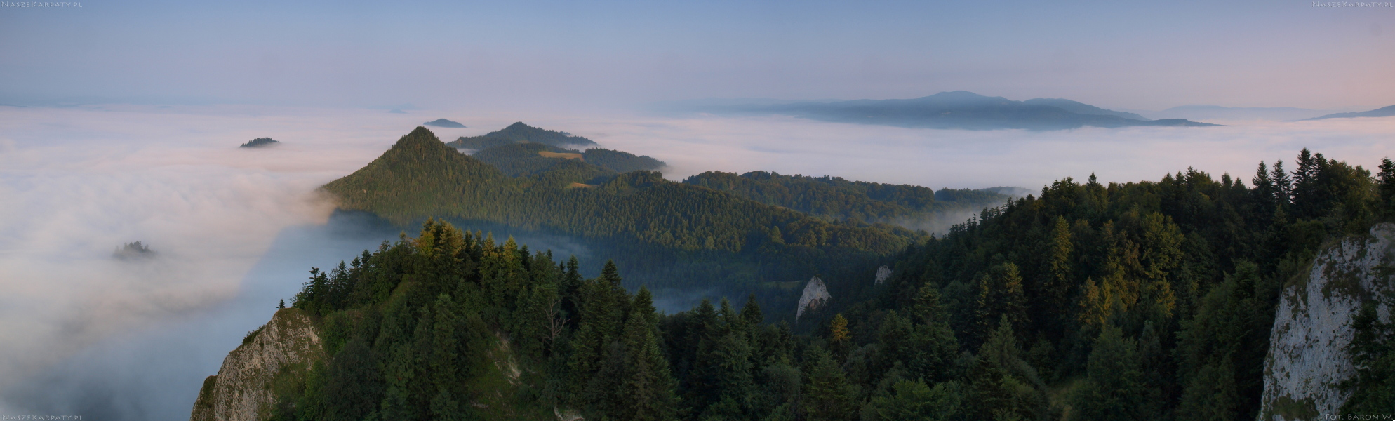 Widok na zachód z Trzech Koron